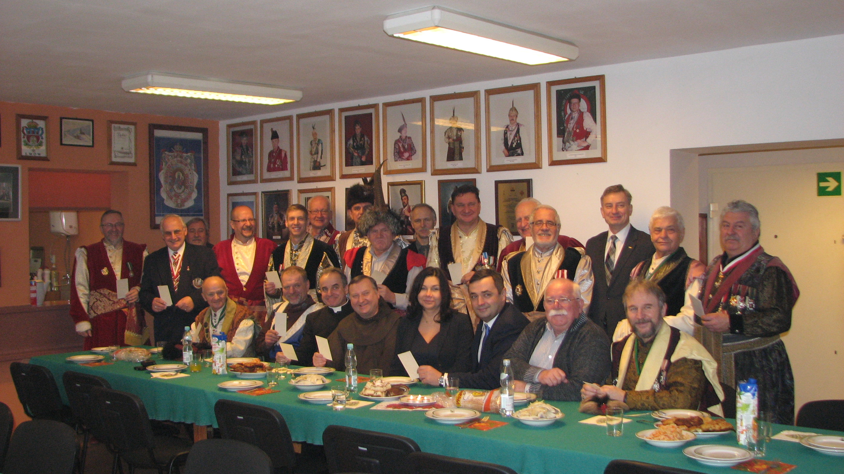 Członkowie mundurowi Towarzystwa Strzeleckiego Bractwa Kurkowego Grodu Bytomskiego wraz z prezydentem miasta Damianem Bartylą w towarzystwie małżonki oraz przedstawicieli Rady Miasta - spotkanie wigilijne 2016